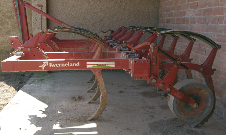 Cisells - Can Garriga de Bergús - Cardona (Bages), 24 d'abril de 2004.